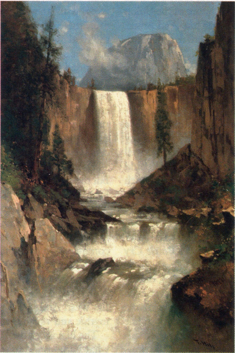 Yosemite